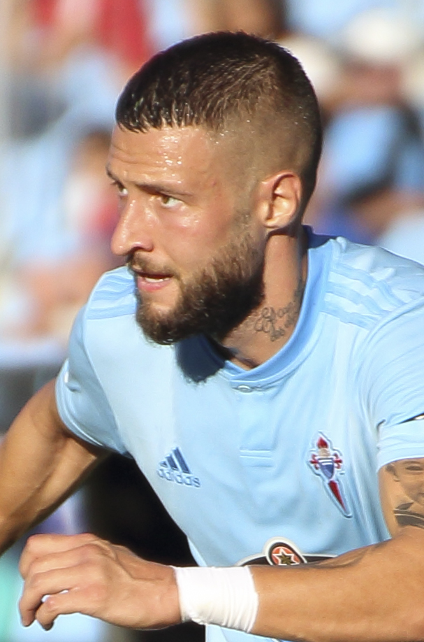 Partido disputado en los aledaños del Estadio de Balaidos, siendo el partido de presentación para el Celta ante su afición para la temporada 2018/2019